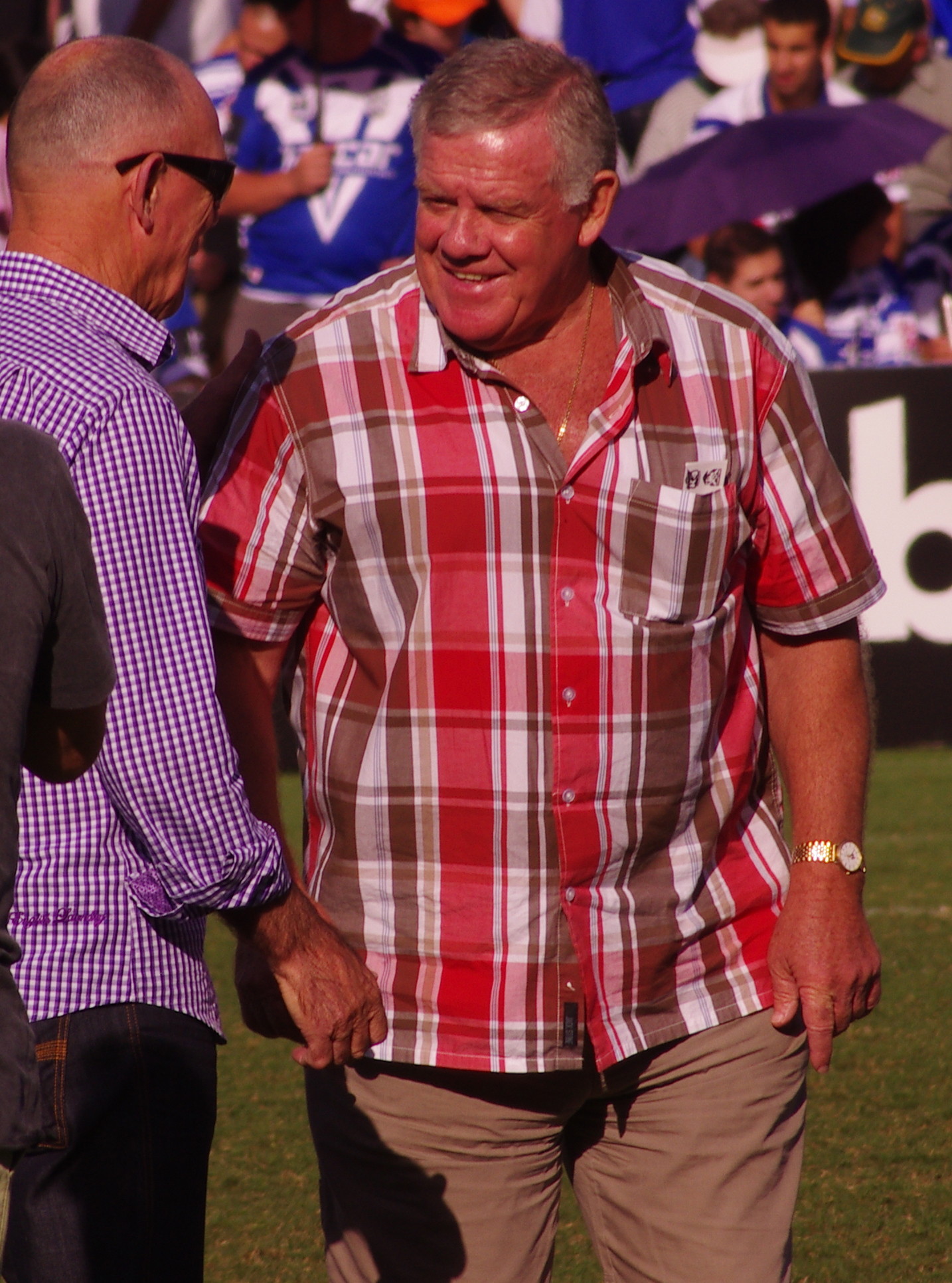 Bob mccarthy